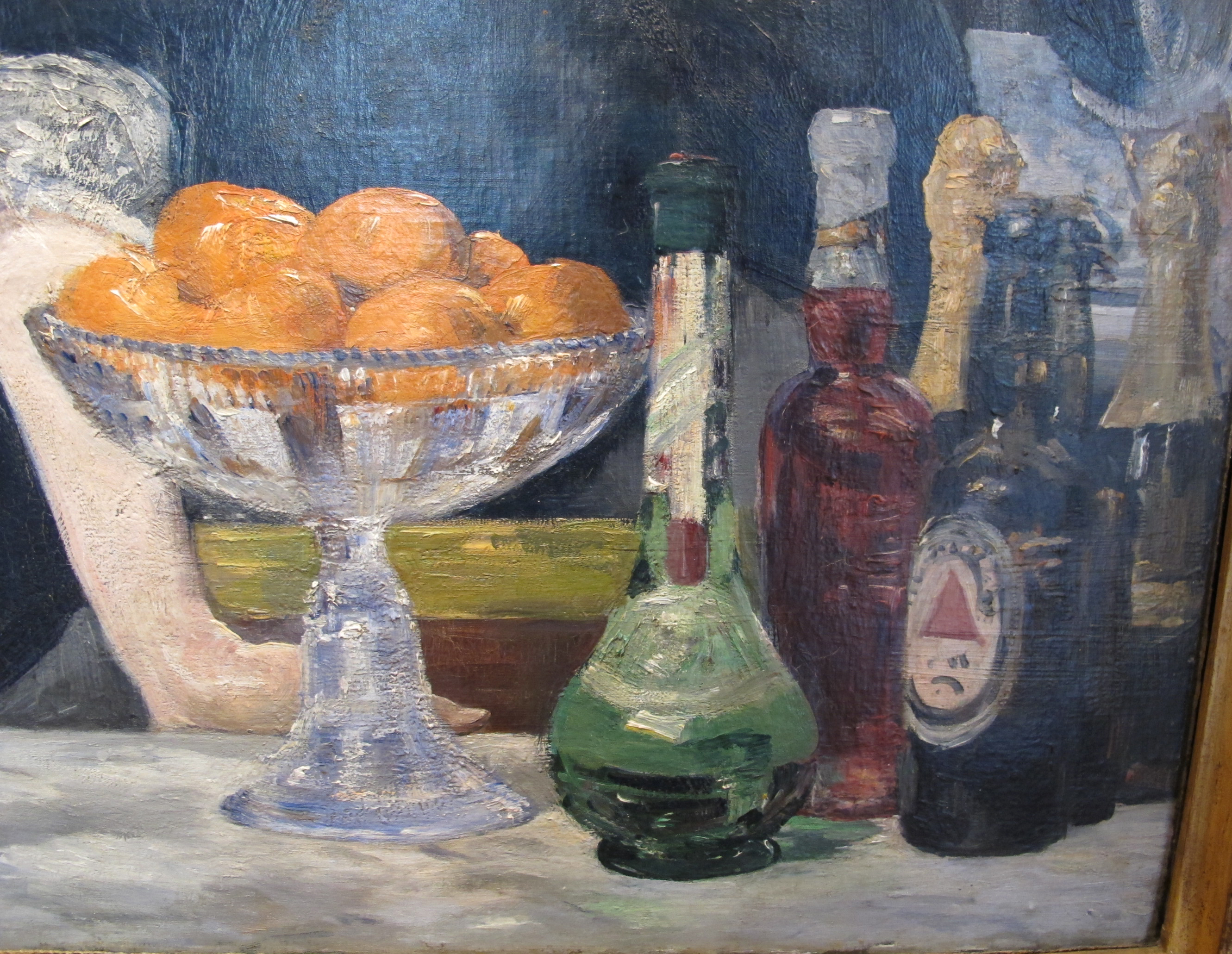 Edouard manet, al bar delle folies-bergere, 1881-1882